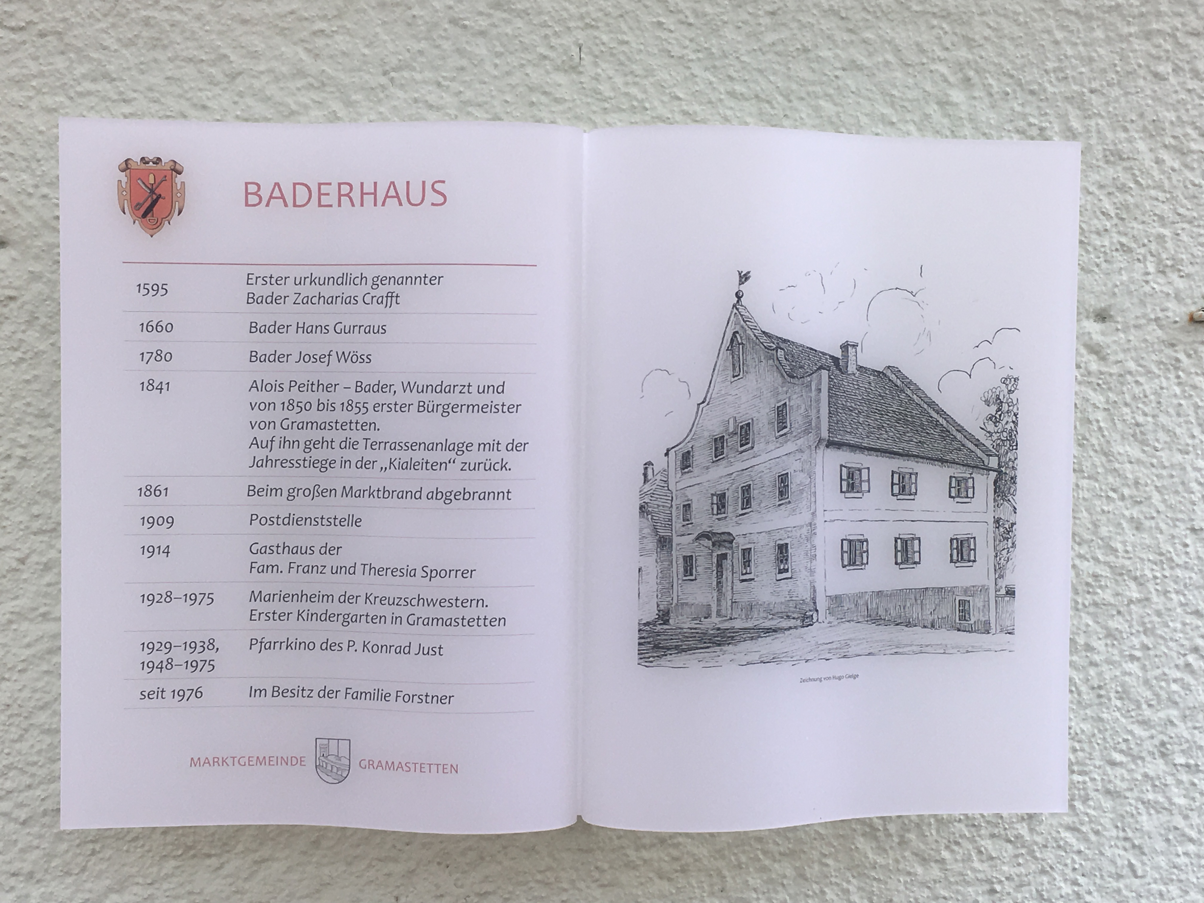 Baderhaus-Plexiglas-Infotafel in Gramastetten.JPG